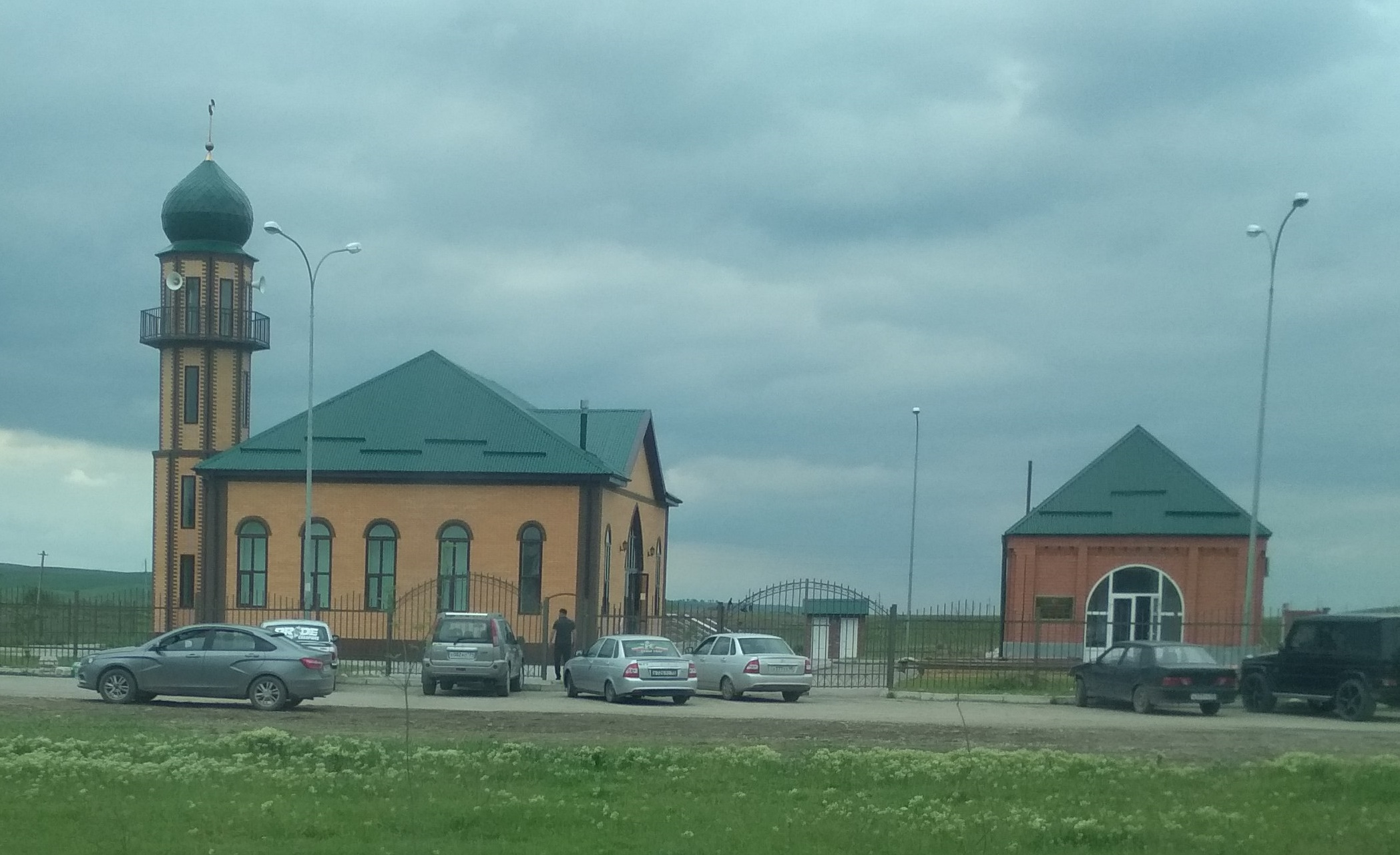 Нохчийн: Юьртан маьждиг